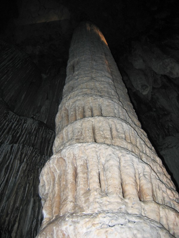 Description: Pilier stalagmitique, ou colonne. Gard, France.Source: Hugo SoriaLicence: GFDL Hugo Soria